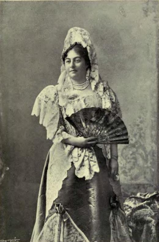 La reina Natalia de Serbia.